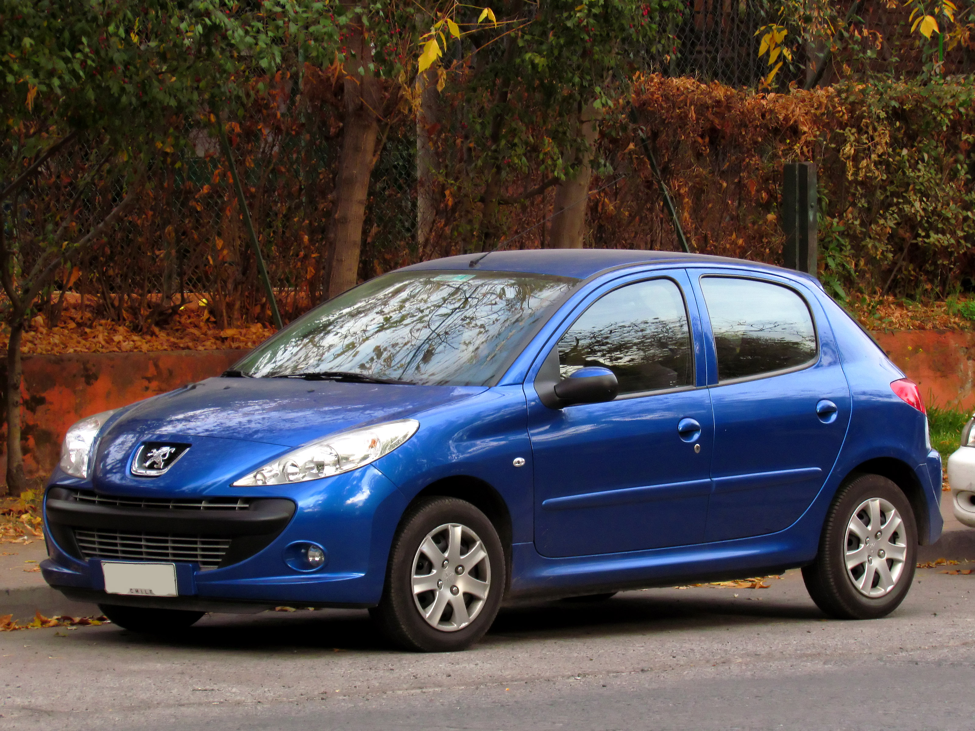 Peugeot 207 Compact 1.4 X-Line 2012